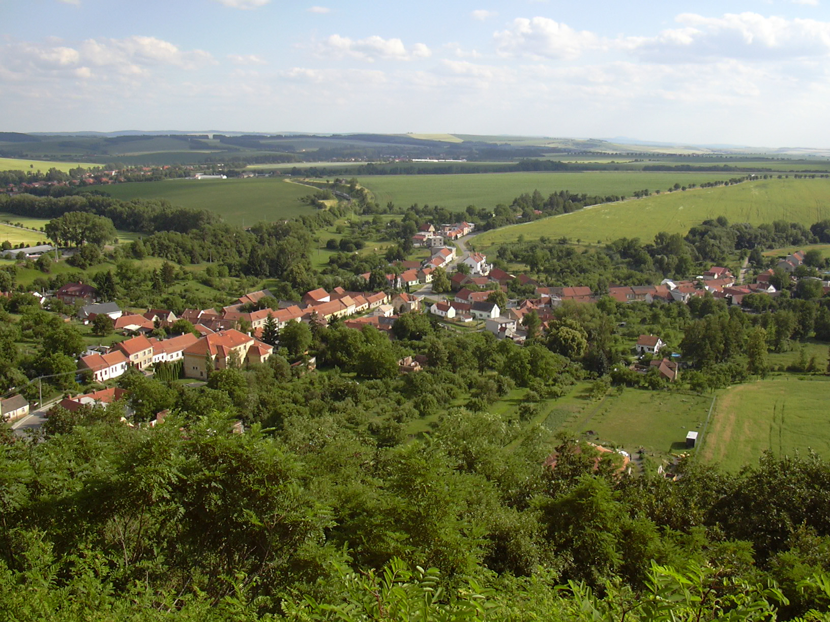 Nemojany (Vyškov District, Czech Republic)